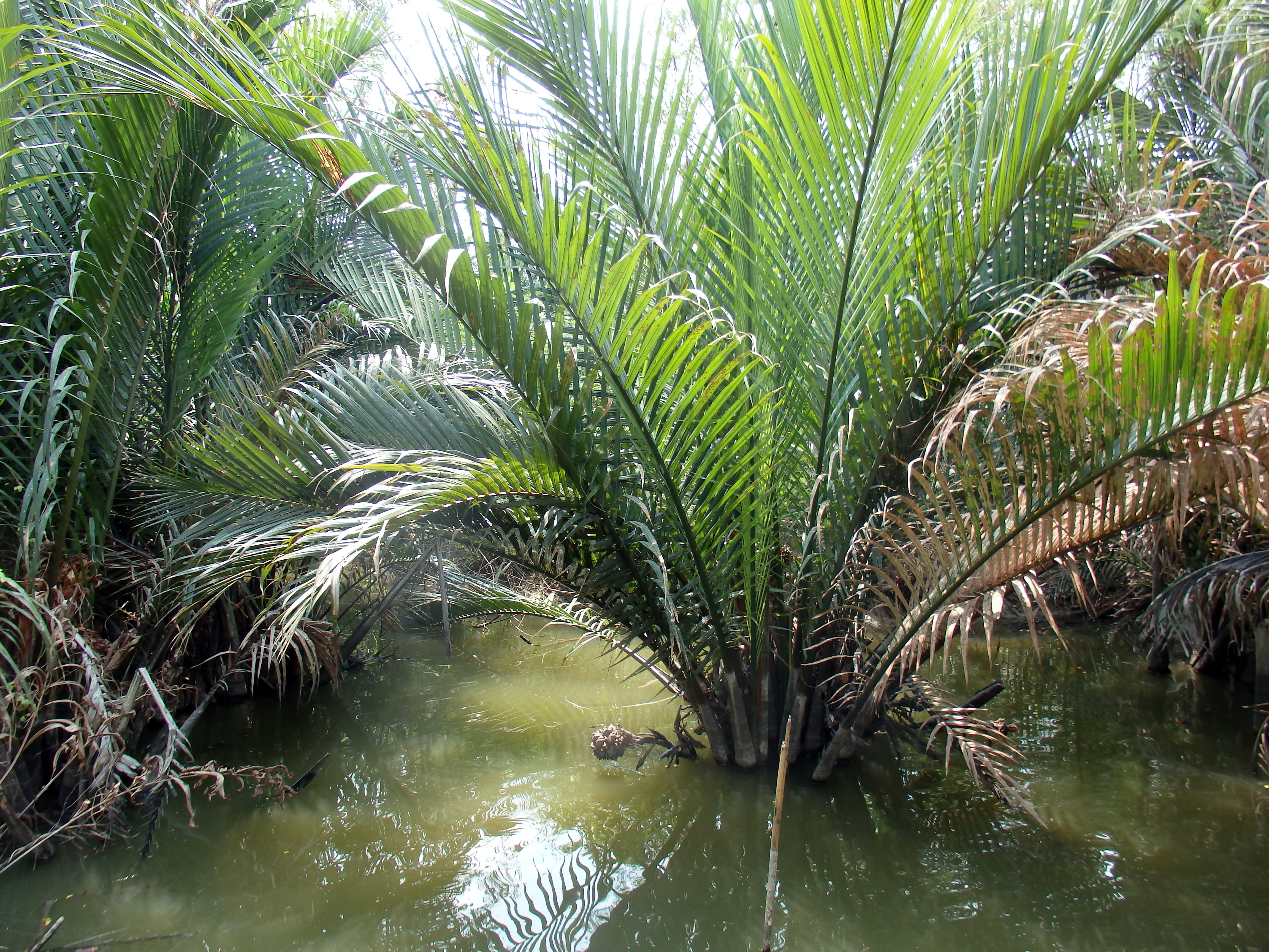 Bang Kachao, Phra Pradaeng District, Samut Prakan, Thailand